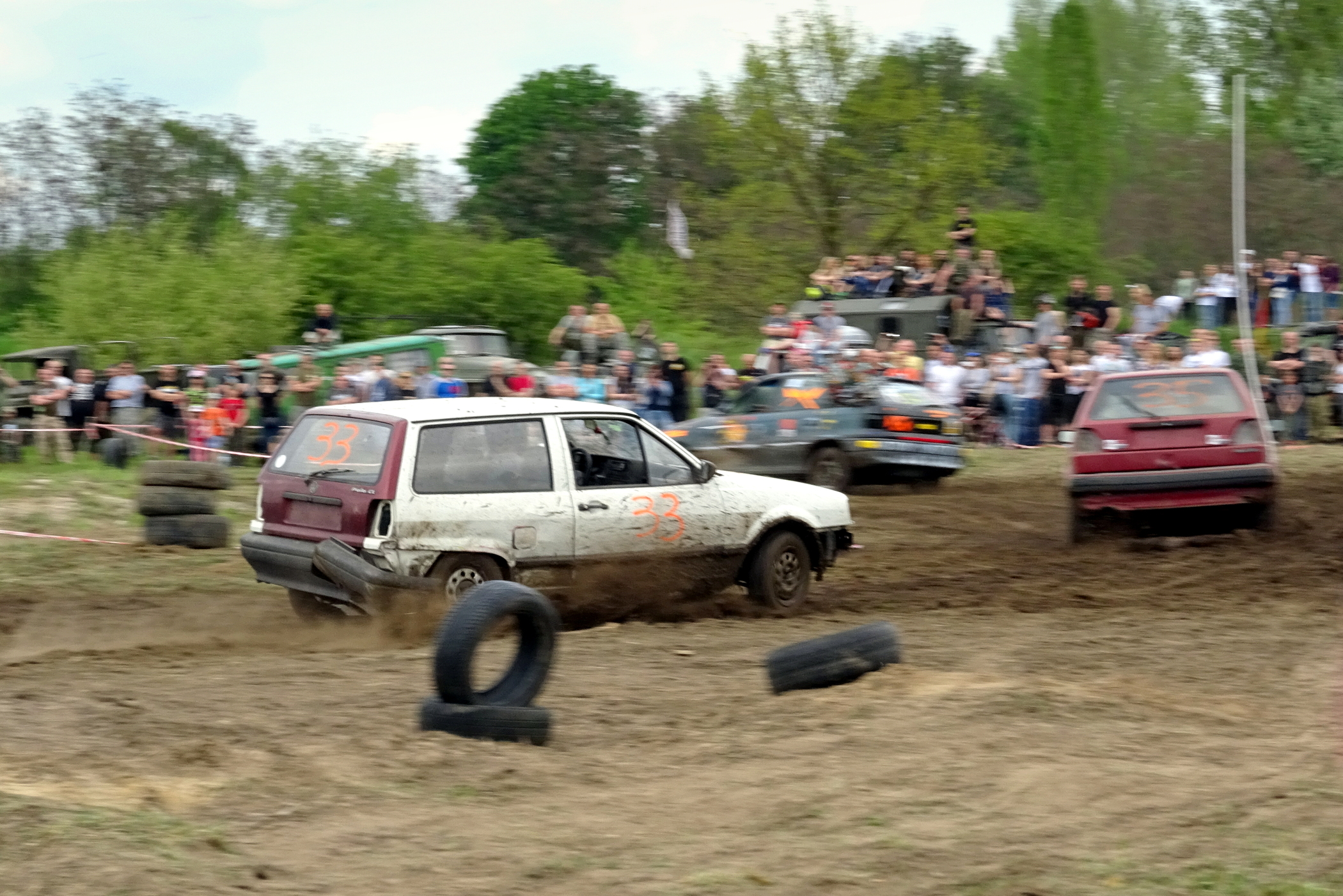 Wyścig "Wrak Race" w Gorzowie Wlkp. podczas III Zlotu Militarnego Operacja KROK. W wyścigu biorą udział przystosowane do jazdy w terenie wraki samochodów o wartości nieprzekraczającej 1000 zł. Wygrywa ten kto w pół godziny da radę przejechać najwięcej okrążeń.